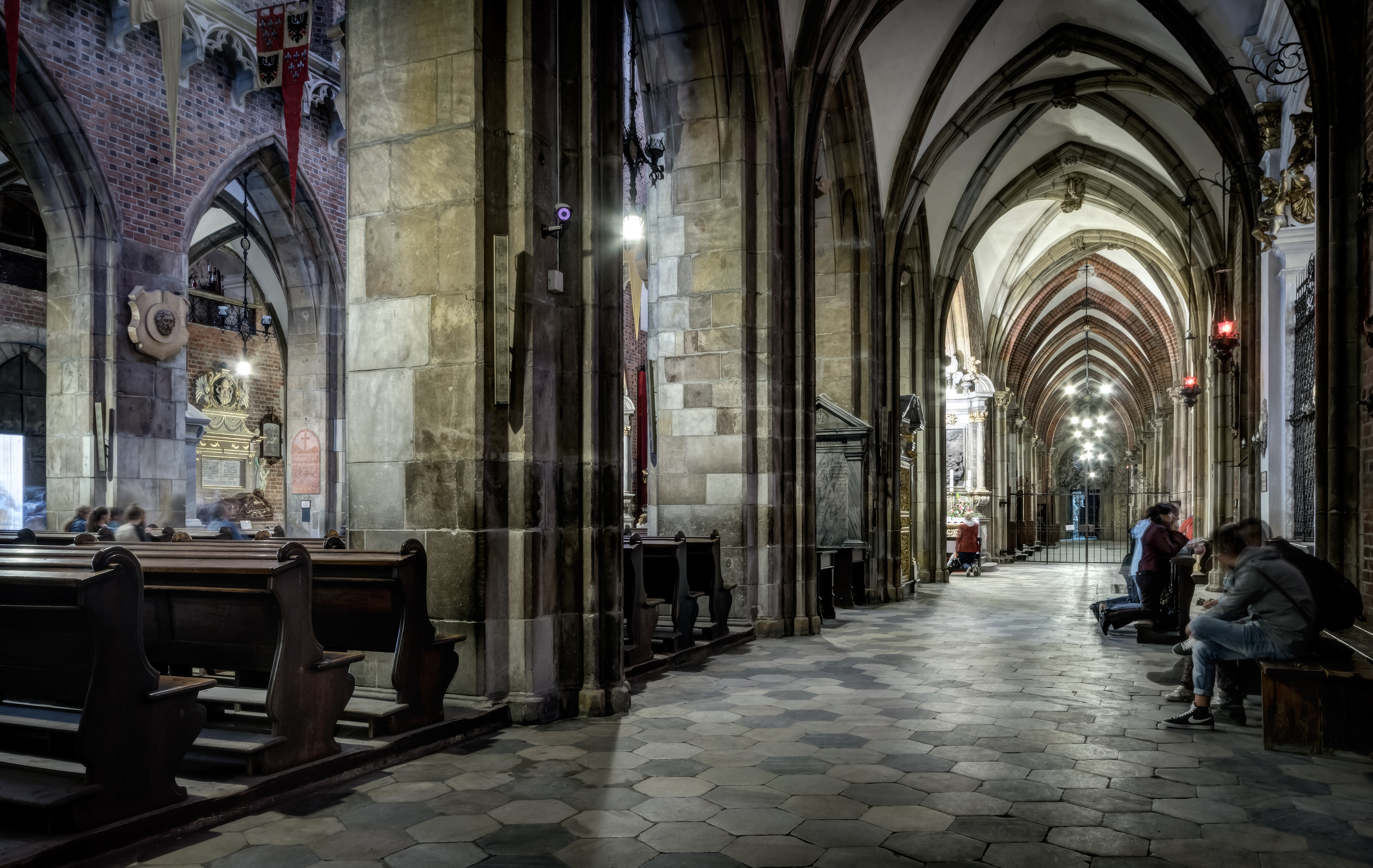 Wrocław, katedra p.w. św. Jana Chrzciciela, 1244-1272, XIV/XV, XIX, po 1945, wnętrze